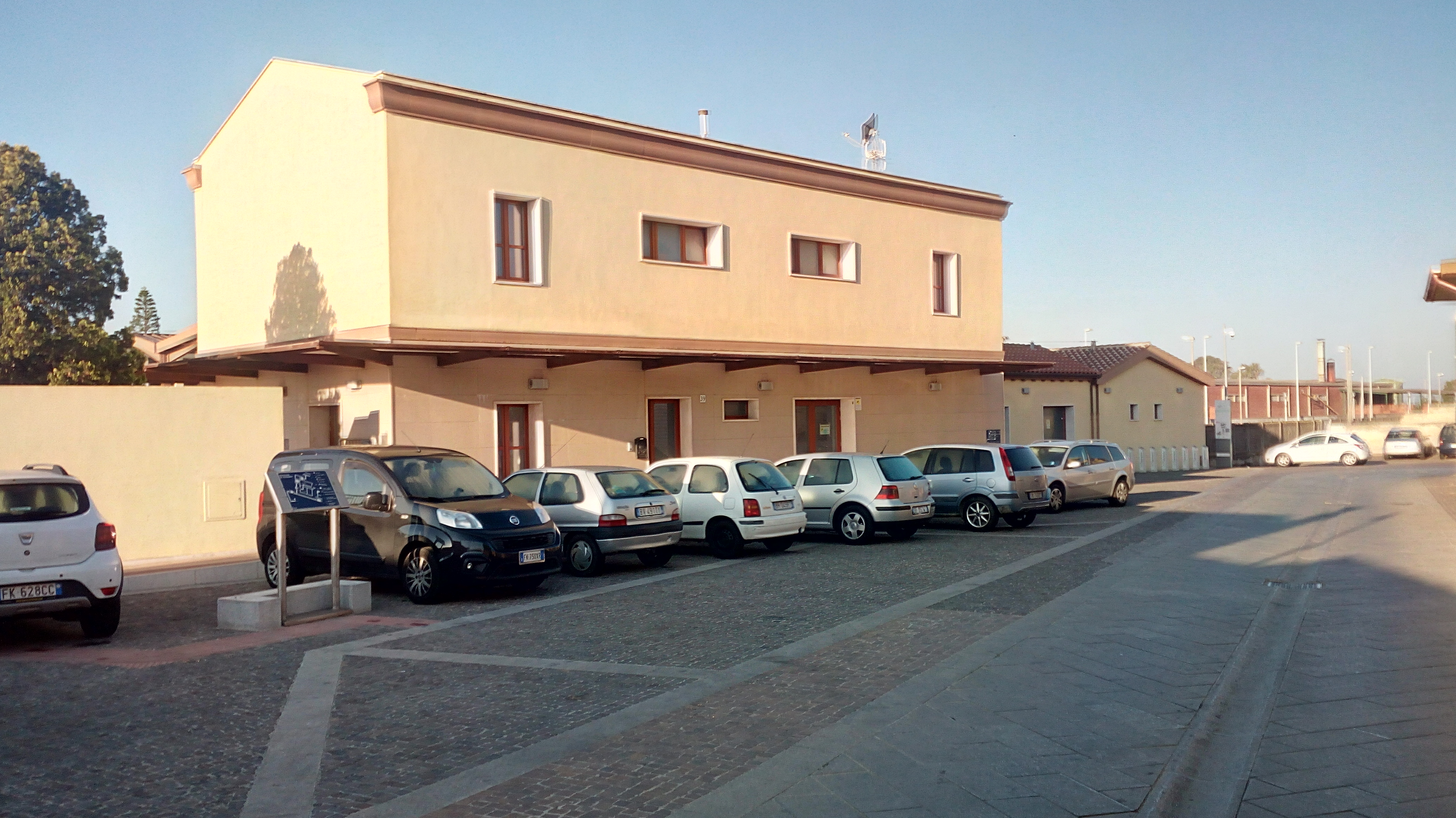 Vista esterna del fabbricato viaggiatori della stazione di Assemini.